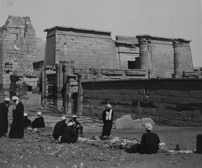 Exclusief passe-partout